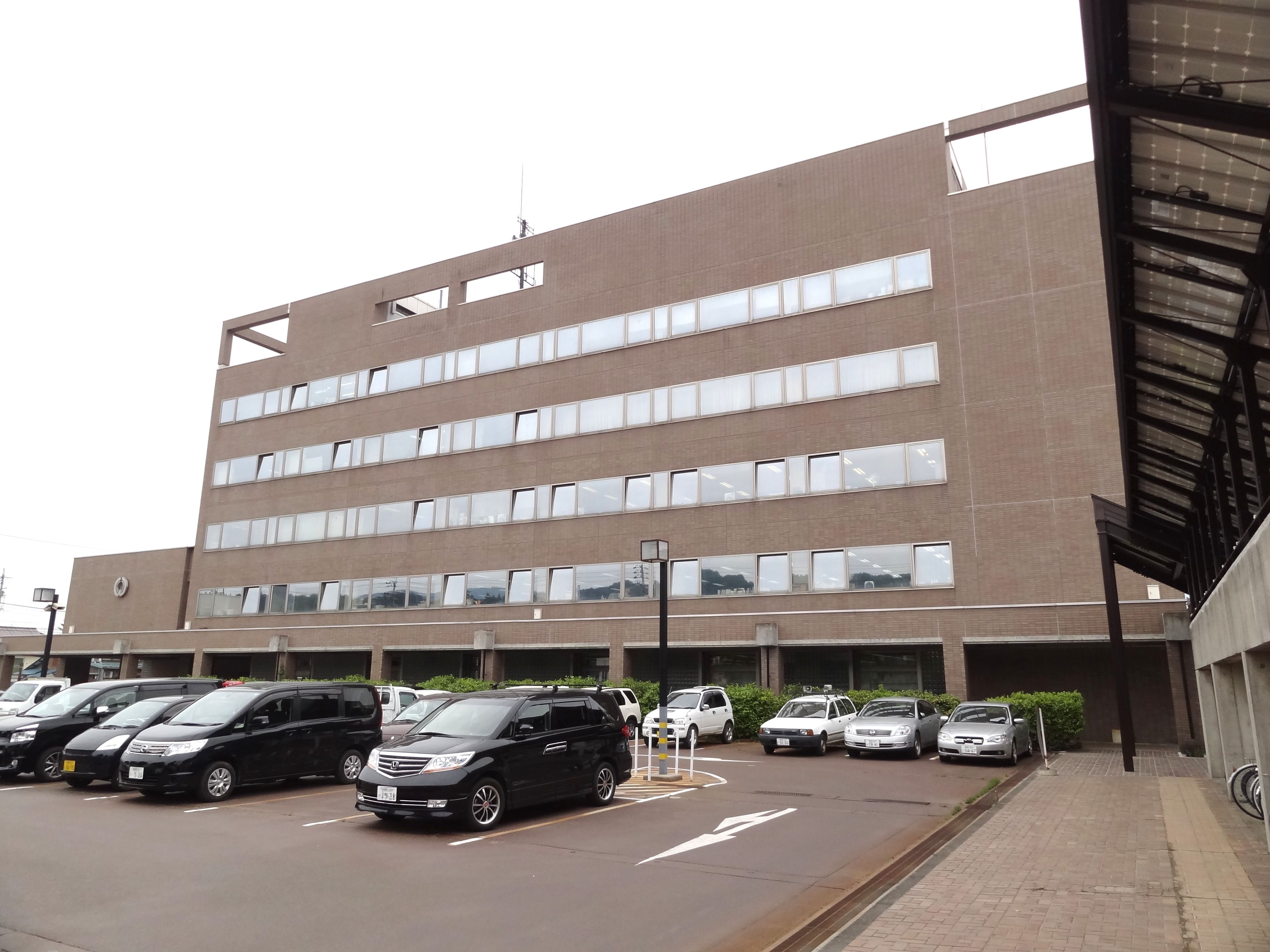 飯山市役所